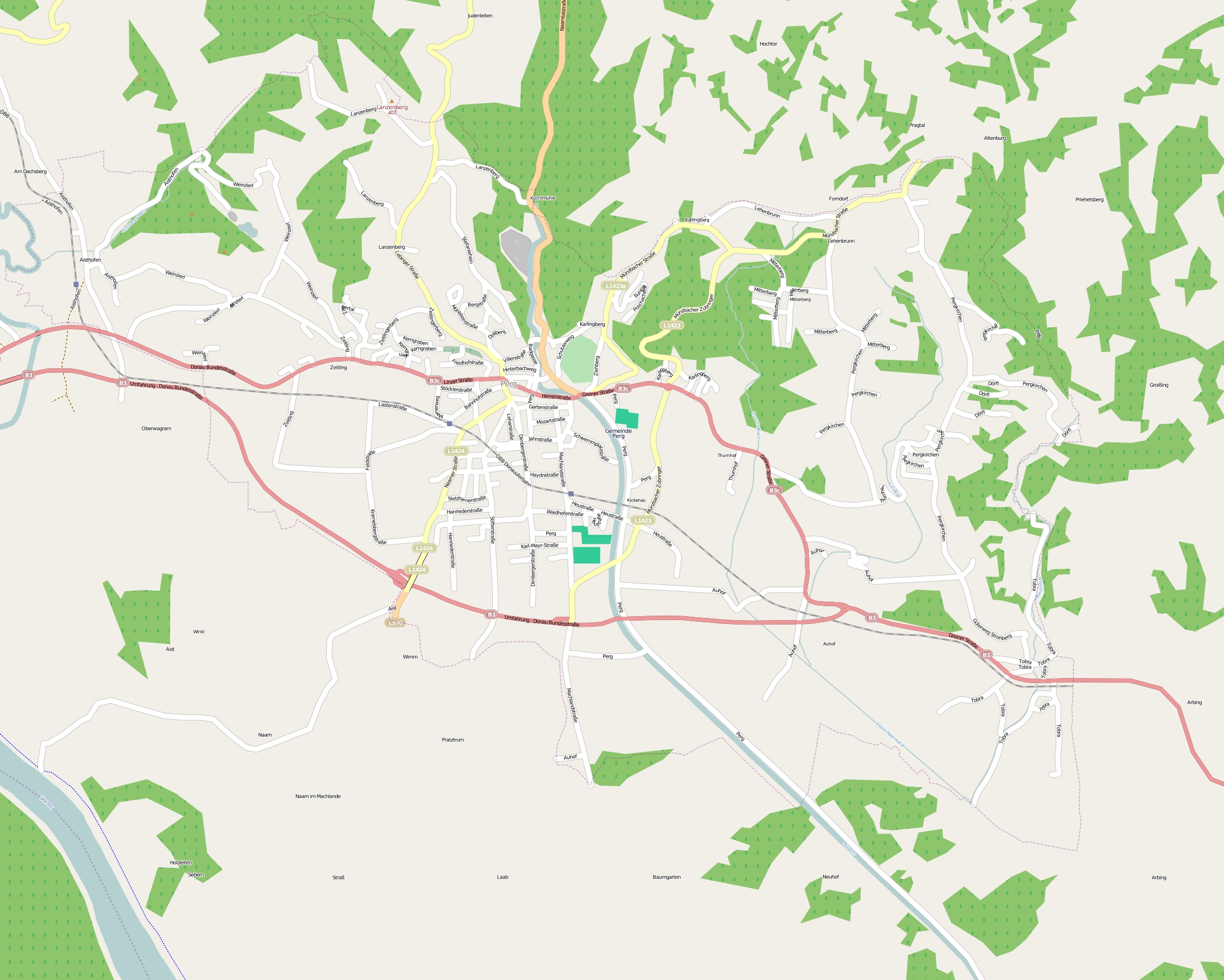 Kartenausschnitt aus Open Street Map